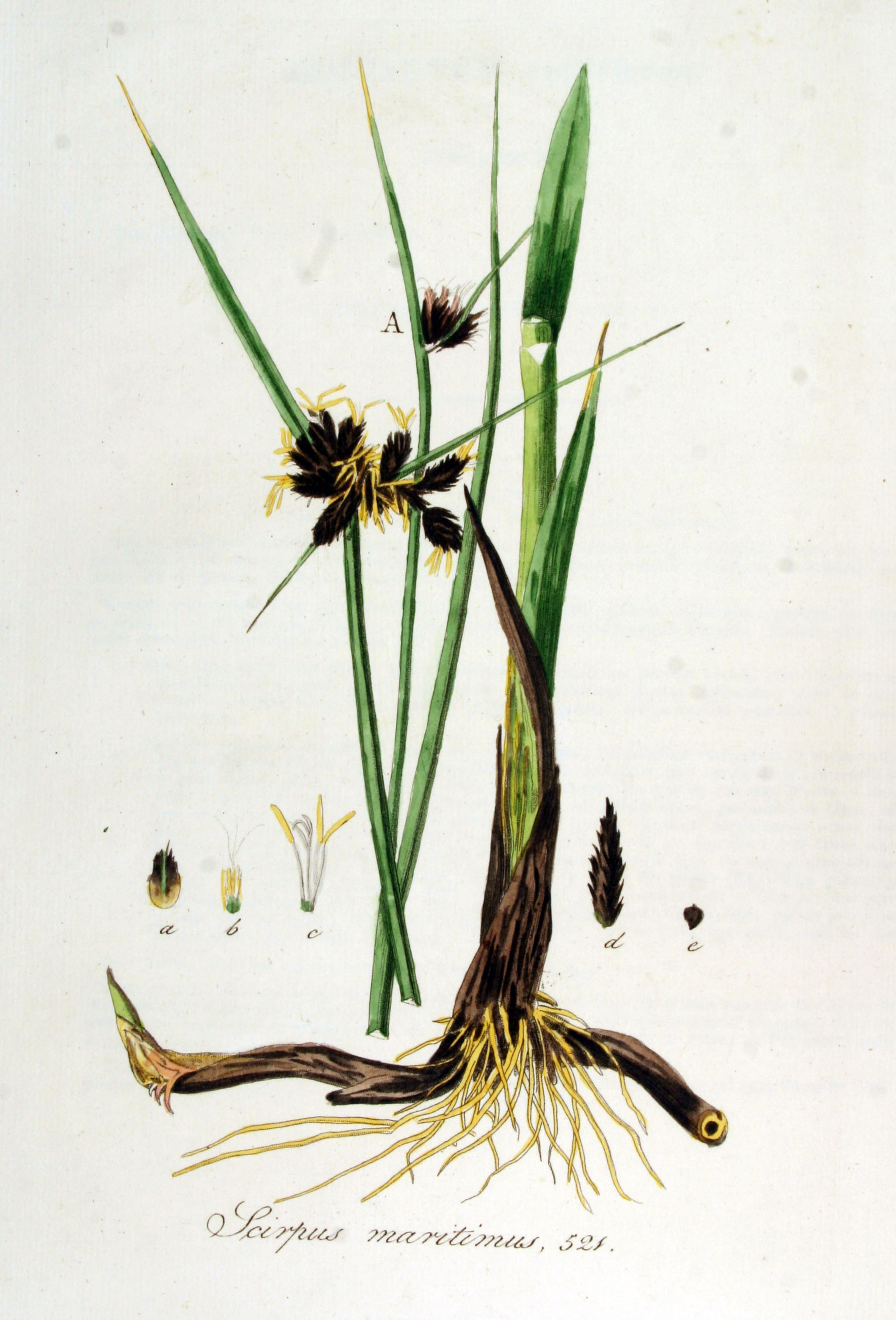 Bolboschoenus maritimus (L.) Palla (Syn. Scirpus maritimus L.)